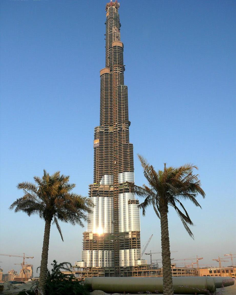 Foto del edificio en construcción Burj Dubai